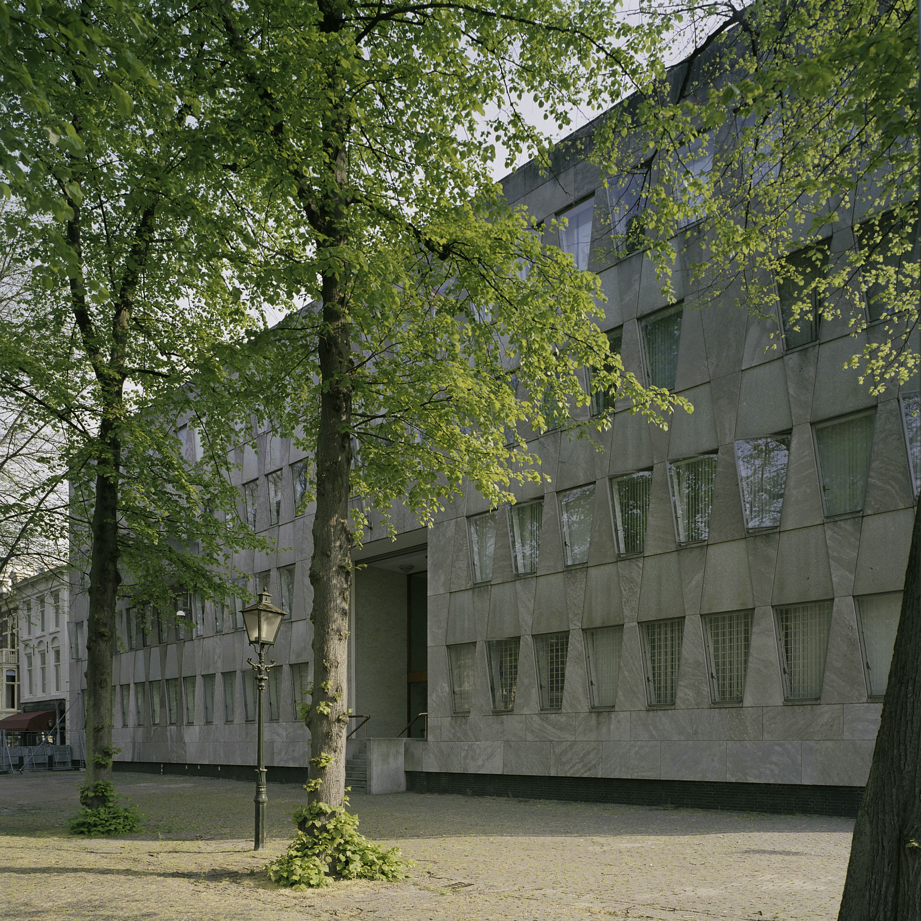 Voormalige Amerikaanse ambassade: Overzicht van de voorgevel Its number in the list of 89 proposed monuments is: 2013-54 For more information see Dutch Wikipedia: Beschermingsprogramma Wederopbouw 1959-1965